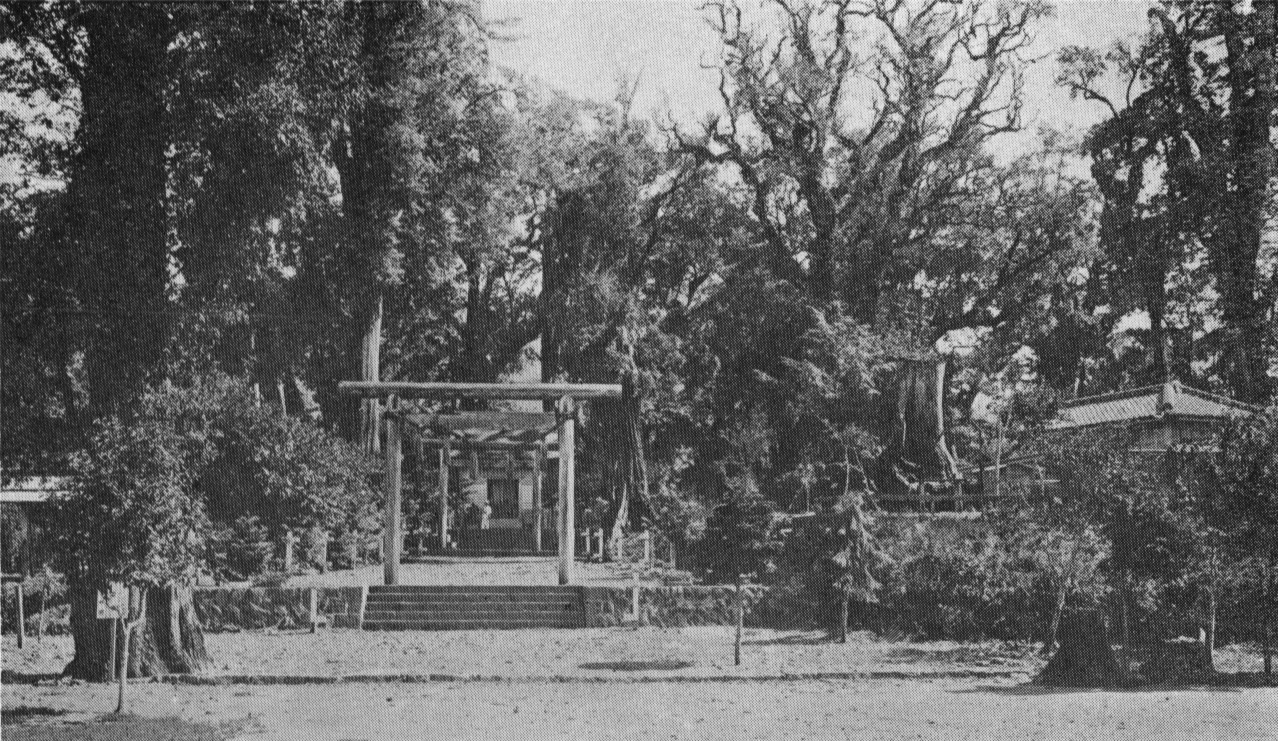 中文（台灣）: 作者：勝山吉作。阿里山神社。典藏者：中央研究院數位物件典藏者：中央研究院數位文化中心。公眾領域標章（Public Domain Mark）。發佈於《開放博物館》